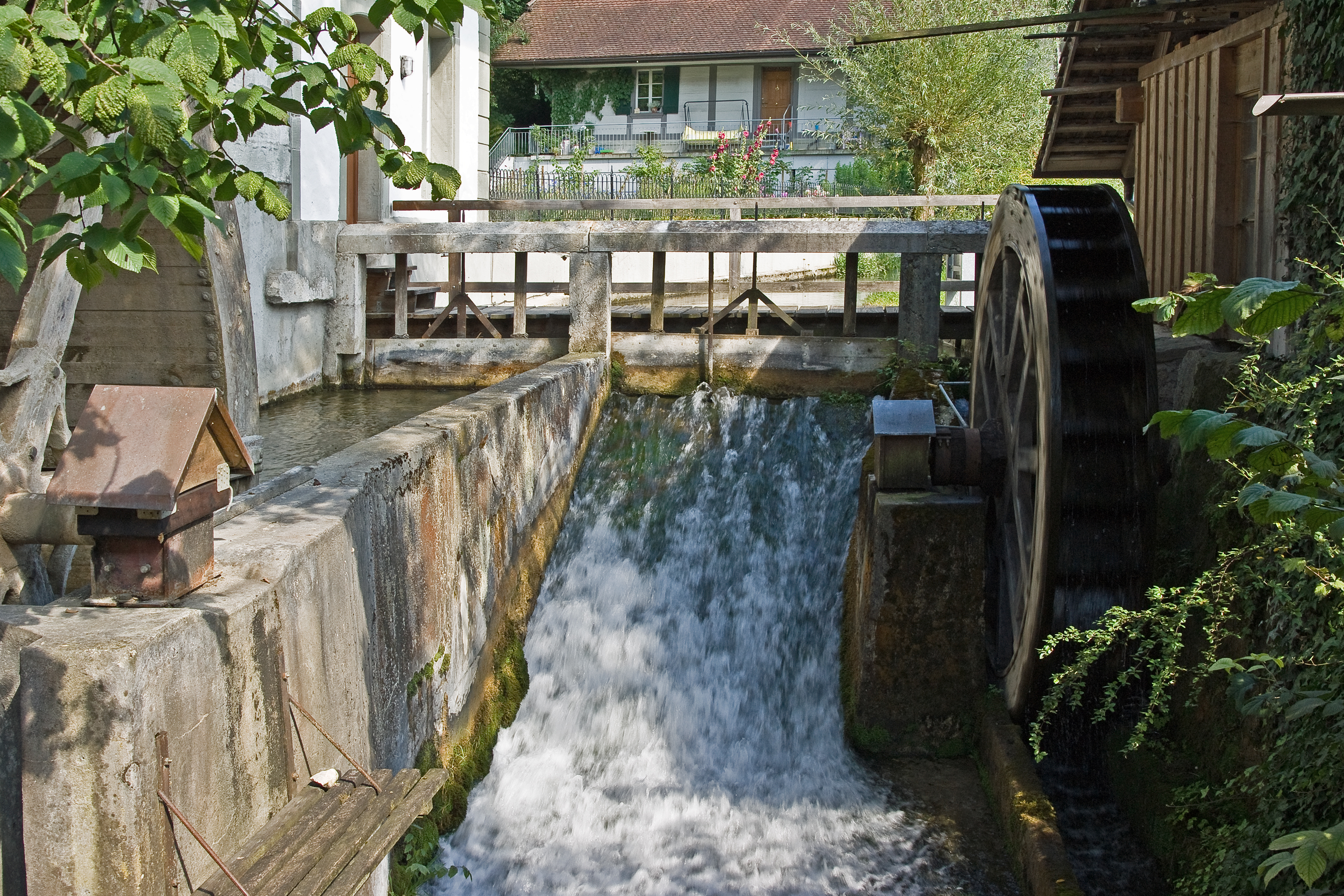 Kulturmühle Lützelflüh, bis 1970 noch in Betrieb, heute nur sporadisch zu Demonstrationszwecken.